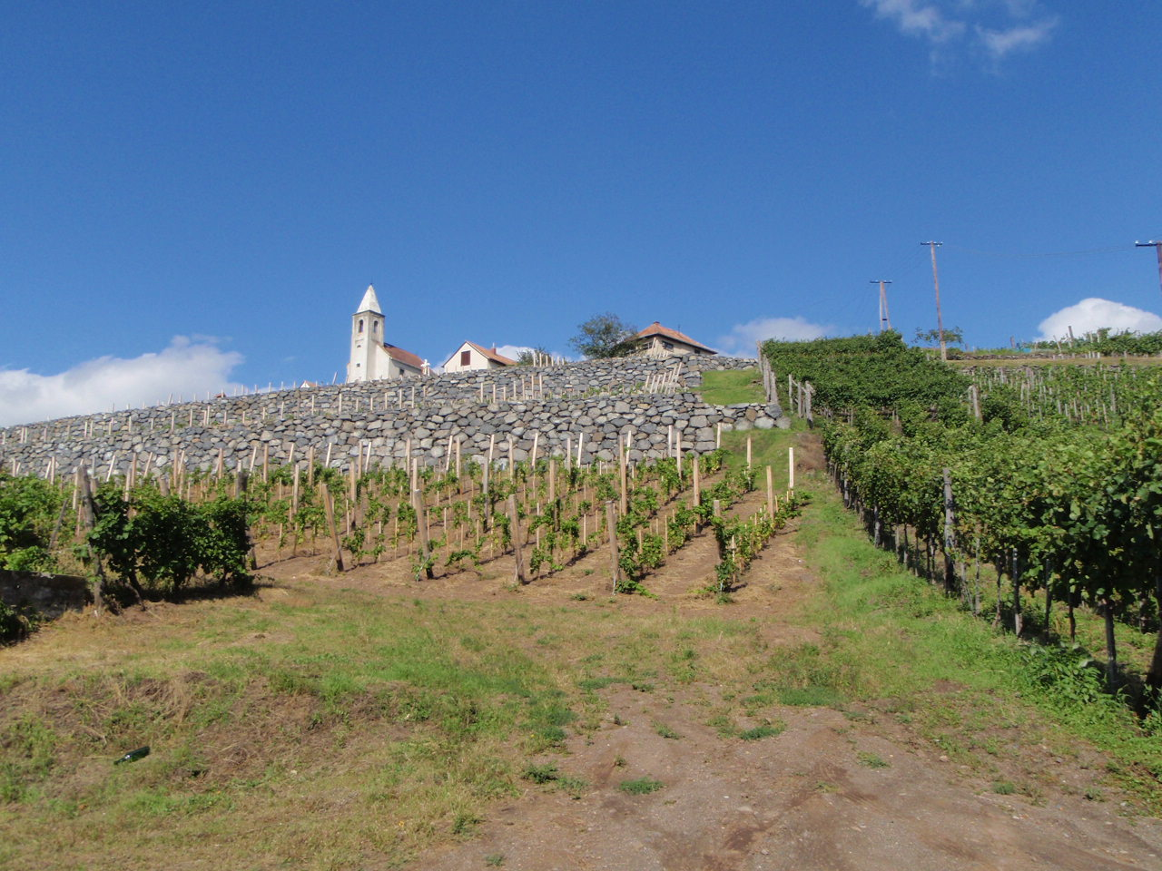 St Helena Kapelle in Somloerberg mit Weinberg